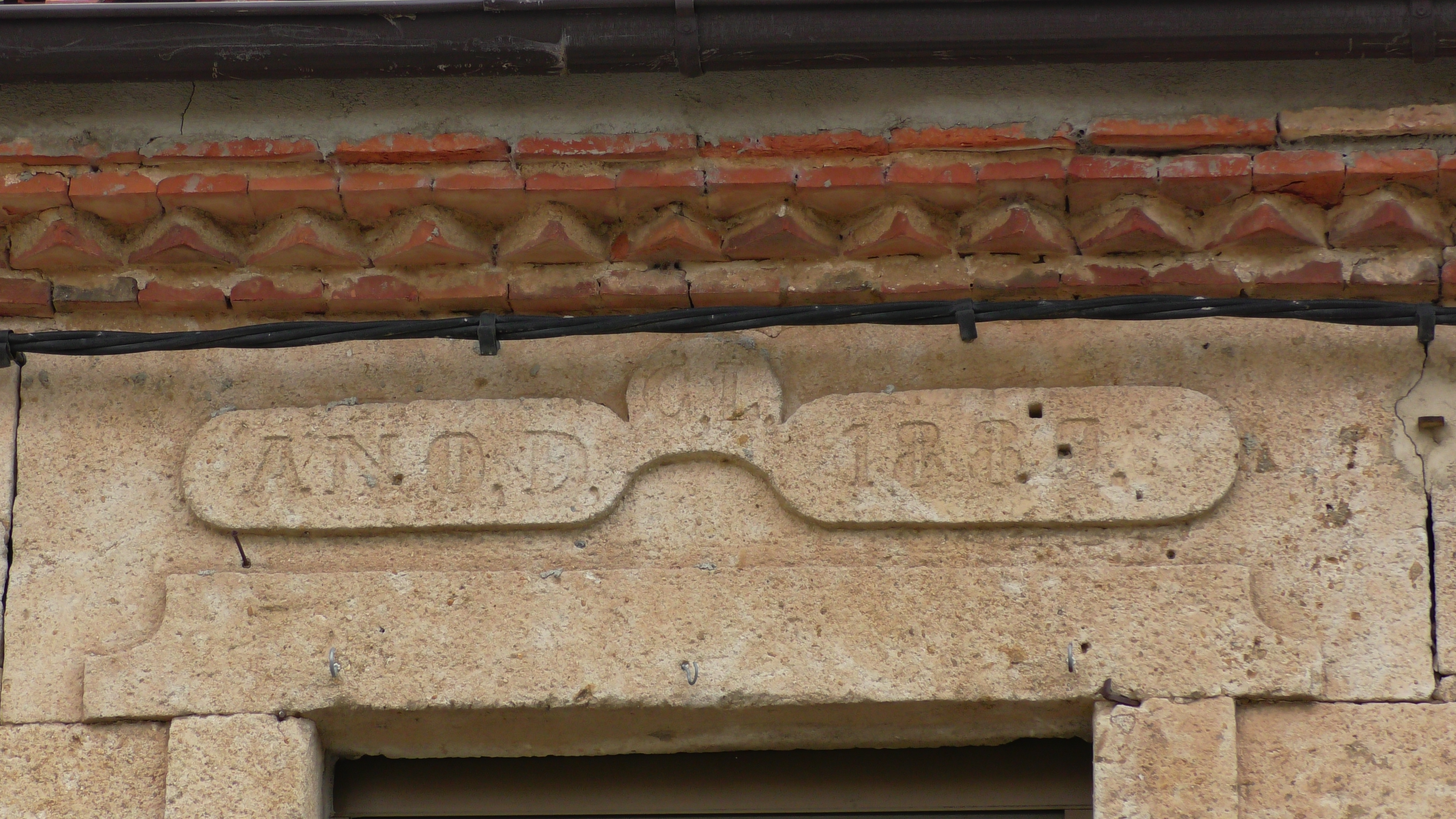 El Cubo del Vino